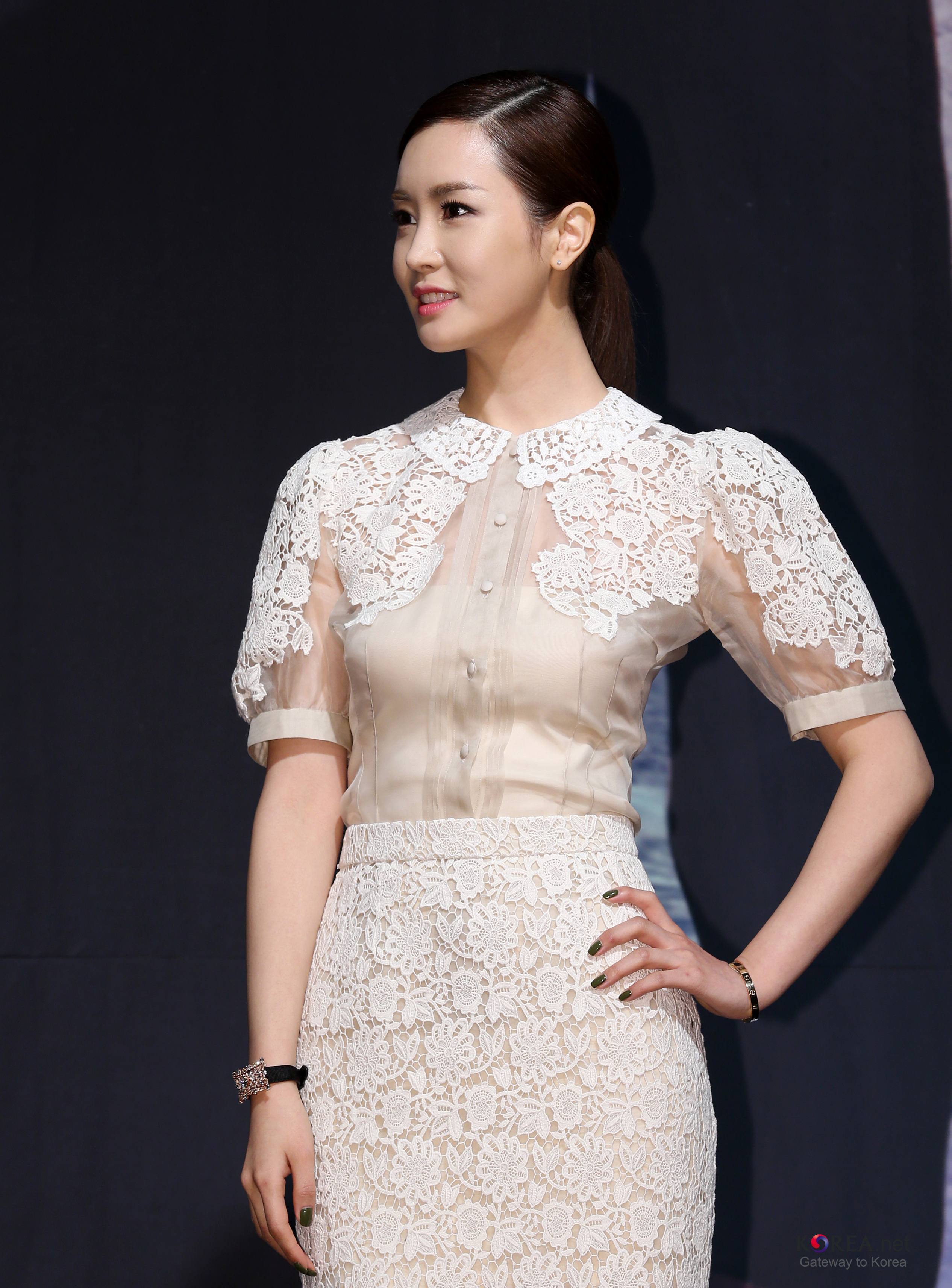 K-Drama 'IRIS 2' Press Conference NSS agent Ji Soo-yeon (Lee Da-hae ) Lotte Hotel, Seoul 2013.02.07. Ministry of Culture, Sports and Tourism Korean Culture and Information Service Jeon Han Articles about IRIS2 Korean blockbuster drama Iris returns (日本語) 韓国ドラマ、2013年のキーワードは“アクション” ブロックバスタードラマ「アイリス(IRIS)２」、いよいよ放映 (中文) 2013年韩剧的关键词为“动作” 风靡一时的韩剧《IRIS》将重返荧幕 (Vietnamese) Phim truyền hình hành động lên ngôi năm 2013 Phần 2 của phim truyền hình bom tấn 드라마 아이리스2 제작발표회 권총사격 올림픽 금메달 리스트 출신 NSS 요원 지수연 역을 맡은 이다해 롯데호텔, 서울 문화체육관광부 해외문화홍보원 코리아넷 전한